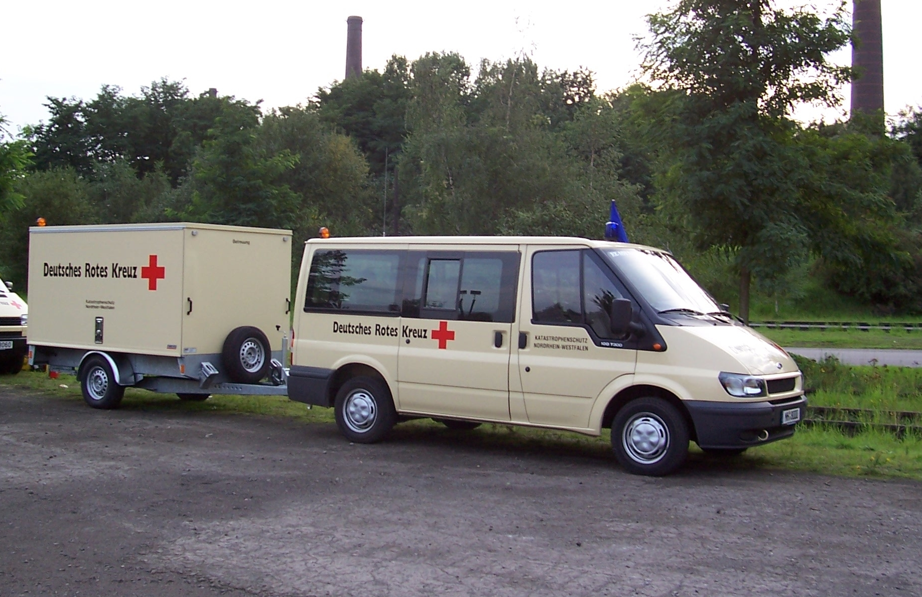 Betreuungskombi mit Anhänger (Land NRW) in Duisburg Landschaftspark-Nord